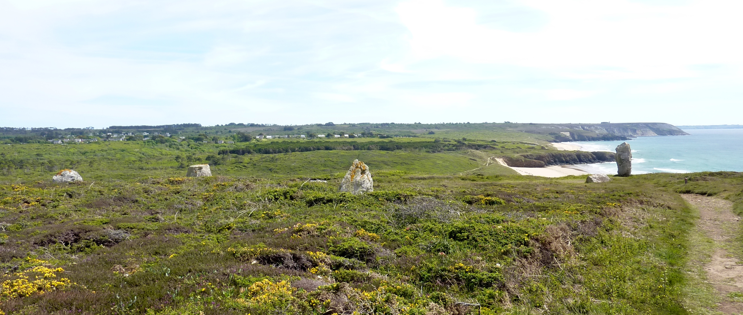 Crozon : les menhirs de Lostmarc'h ; à l'arrière-plan la plage de Lostmarc'h, la pointe de Kerdra, la plage de la Palue et, tout à fait au fond la pointe de Beg ar C'houbez (en direction du Cap de la Chèvre)